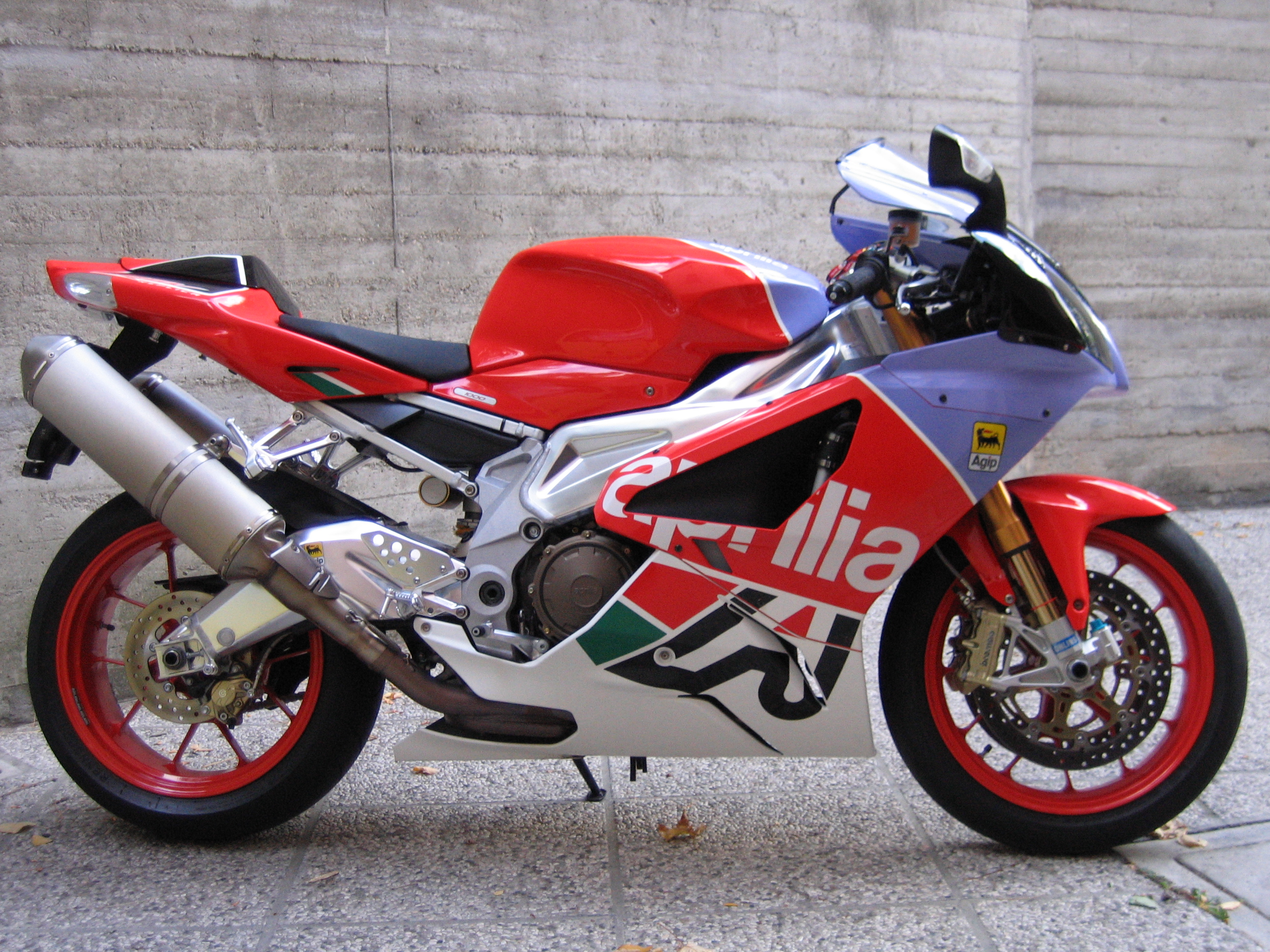 Fabbri Flavio (Flone), macchina fotografica, Aprilia RSV1000R BOL D'OR REPLICA, nessuna tipo do copyright